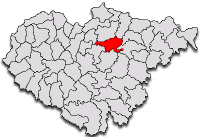 Categorie:Hărţi ale judeţului Sălaj